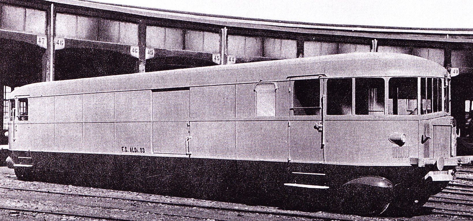 Automotrice ALDb 103 della Fiat (ancora con l'originaria classificazione ALDb 03) a Torino Smistamento nel 1934.